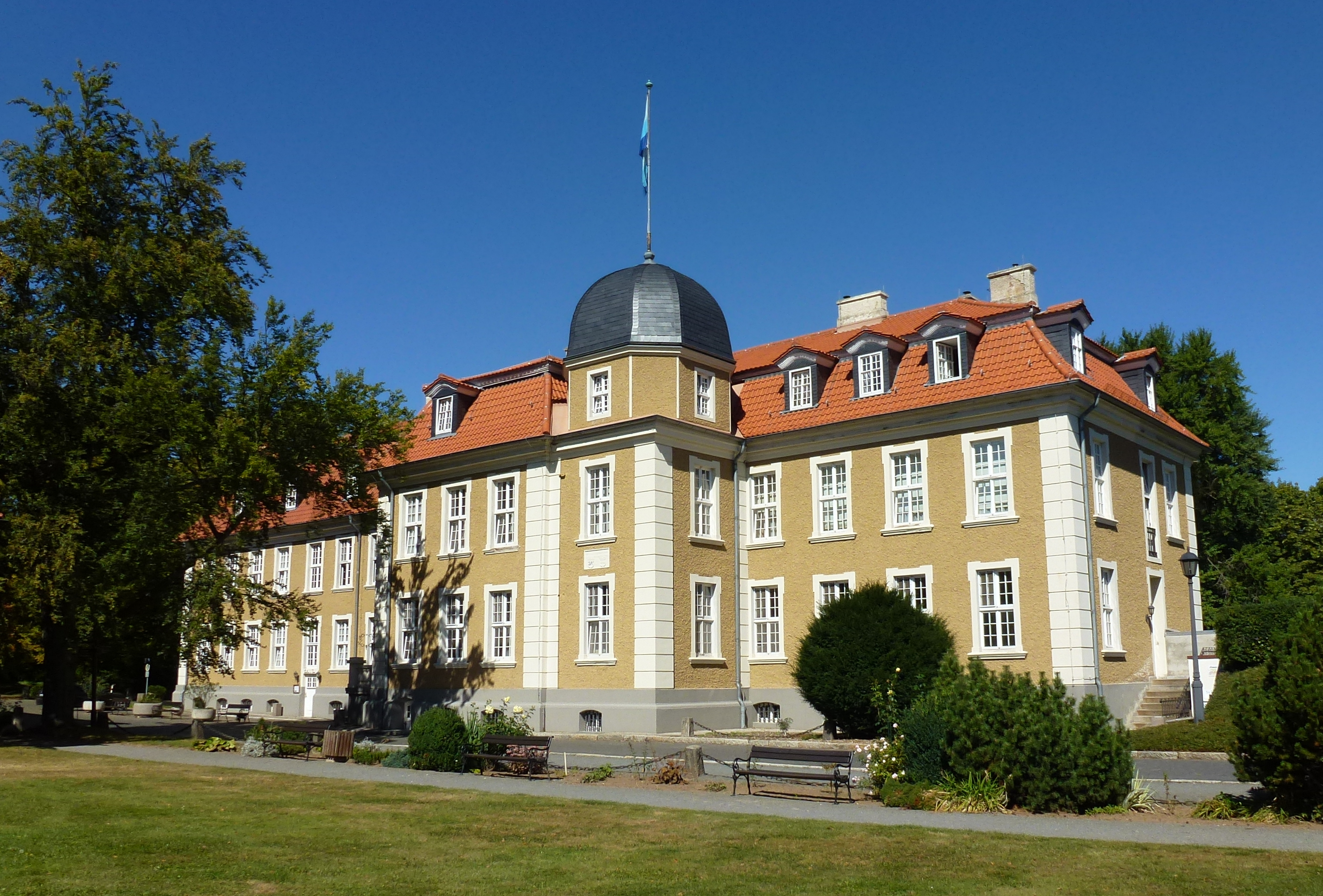 Das Neue Schloss vom Schlosspark aus gesehen.